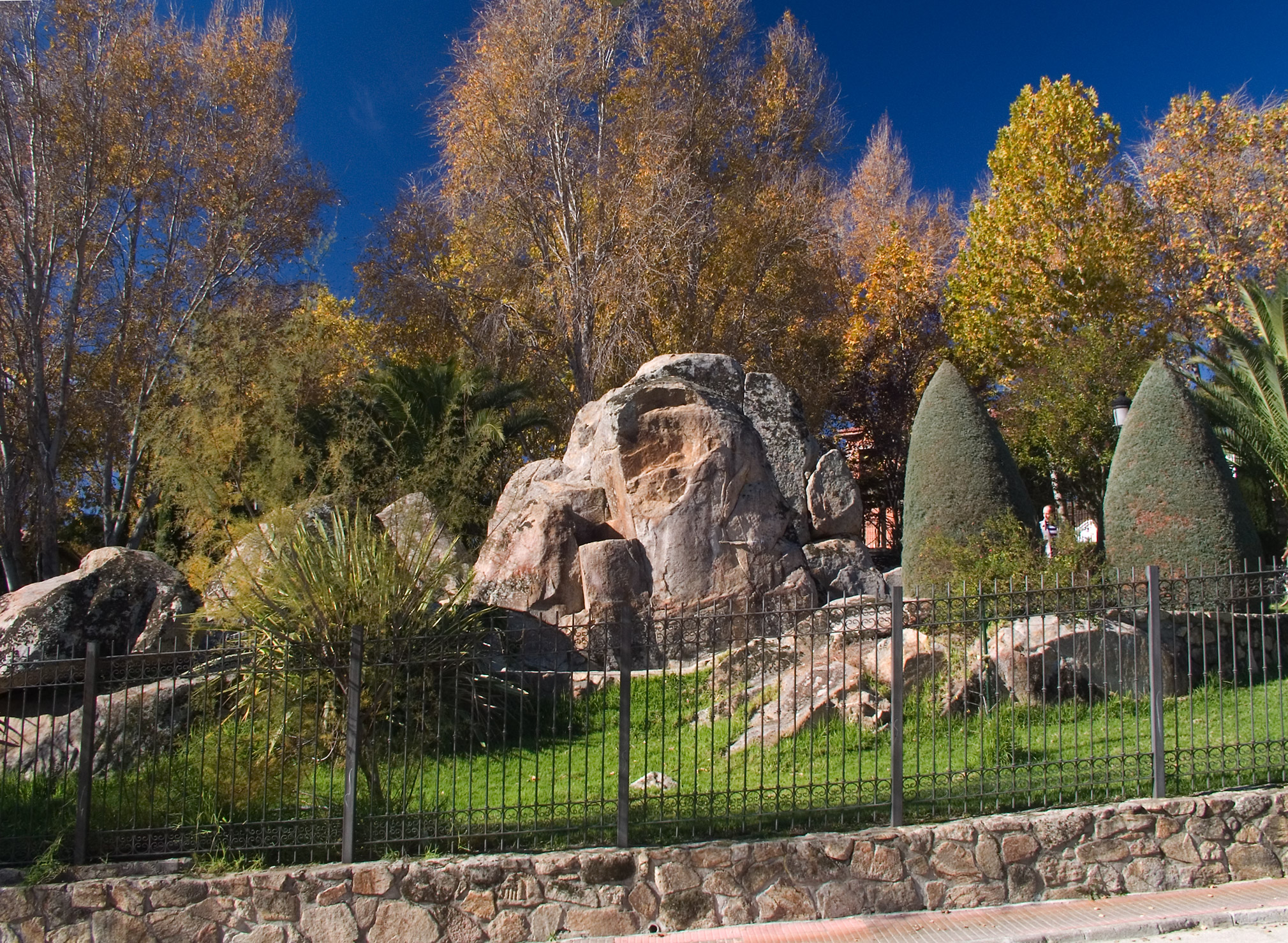 Parque. Losar de la Vera (Cáceres, España).